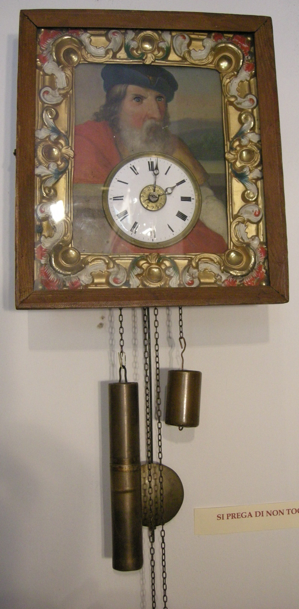 Scale, orologio garibaldi con occhi mobili